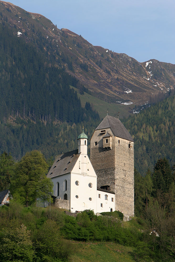 Schloss Freundsberg, Schwaz, Austria